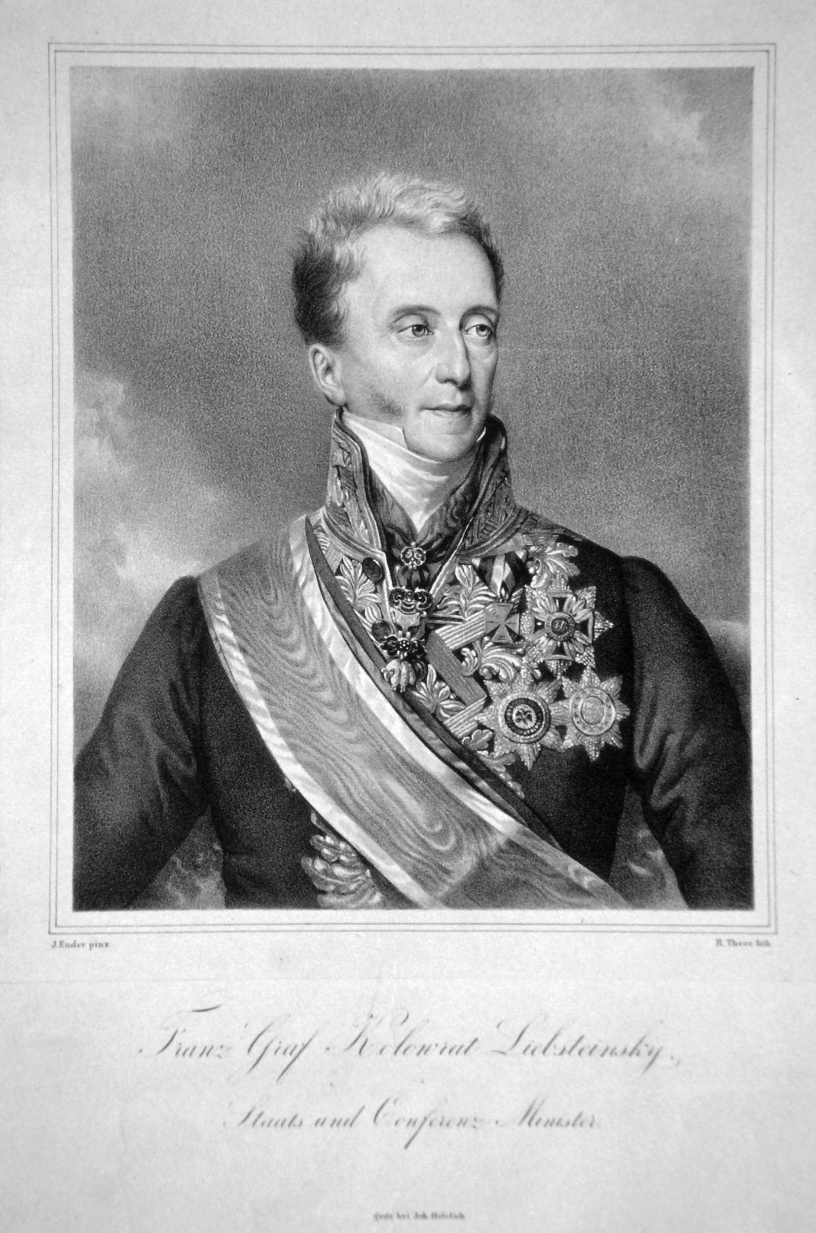 Franz Graf Kolowrat-Liebsteinskytitle QS:P1476,de:"Franz Graf Kolowrat-Liebsteinsky" label QS:Lde,"Franz Graf Kolowrat-Liebsteinsky"